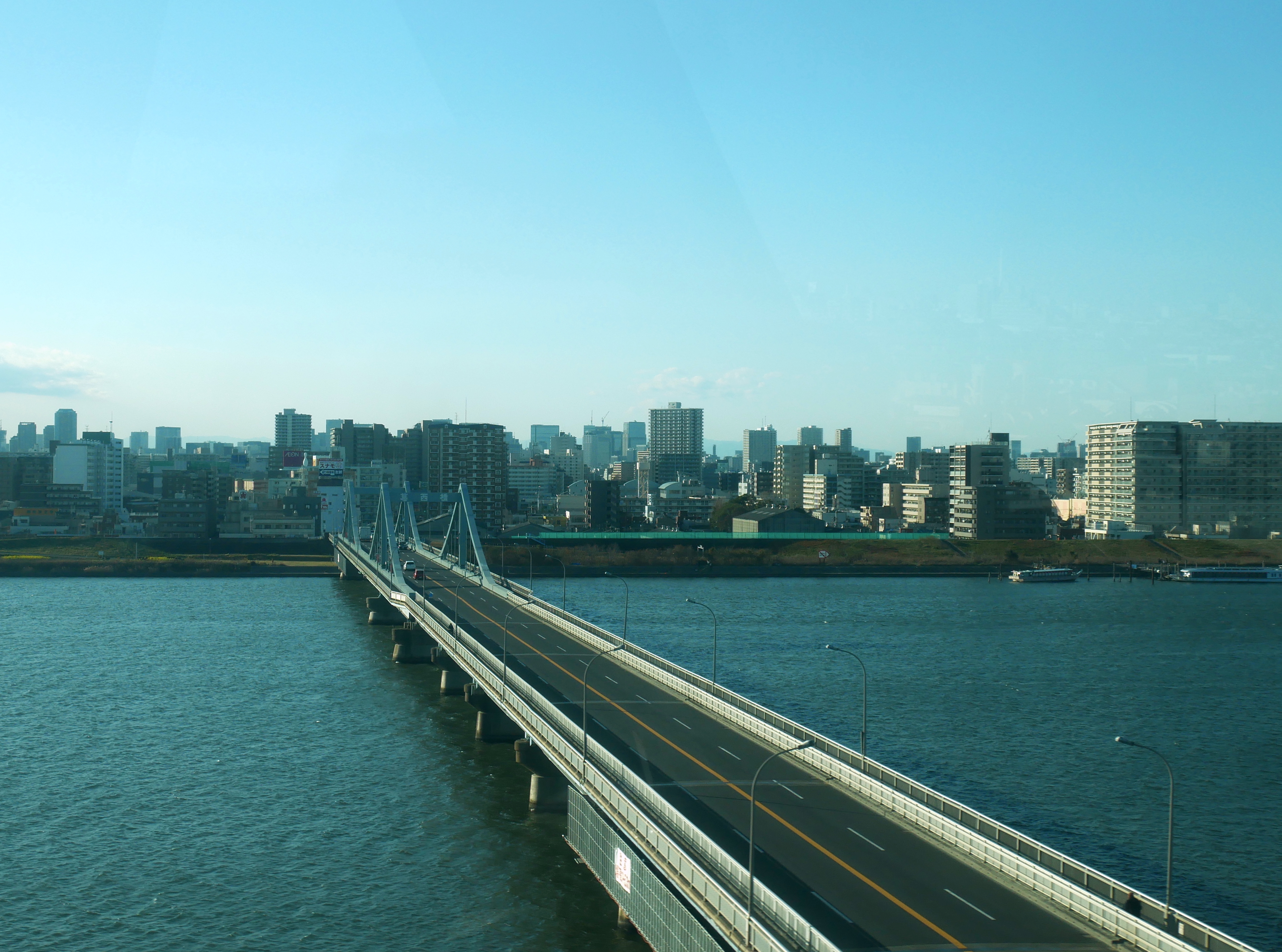 葛西橋 (Kasai Bridge) Panasonic Lumix DMC-GX7 Mark II